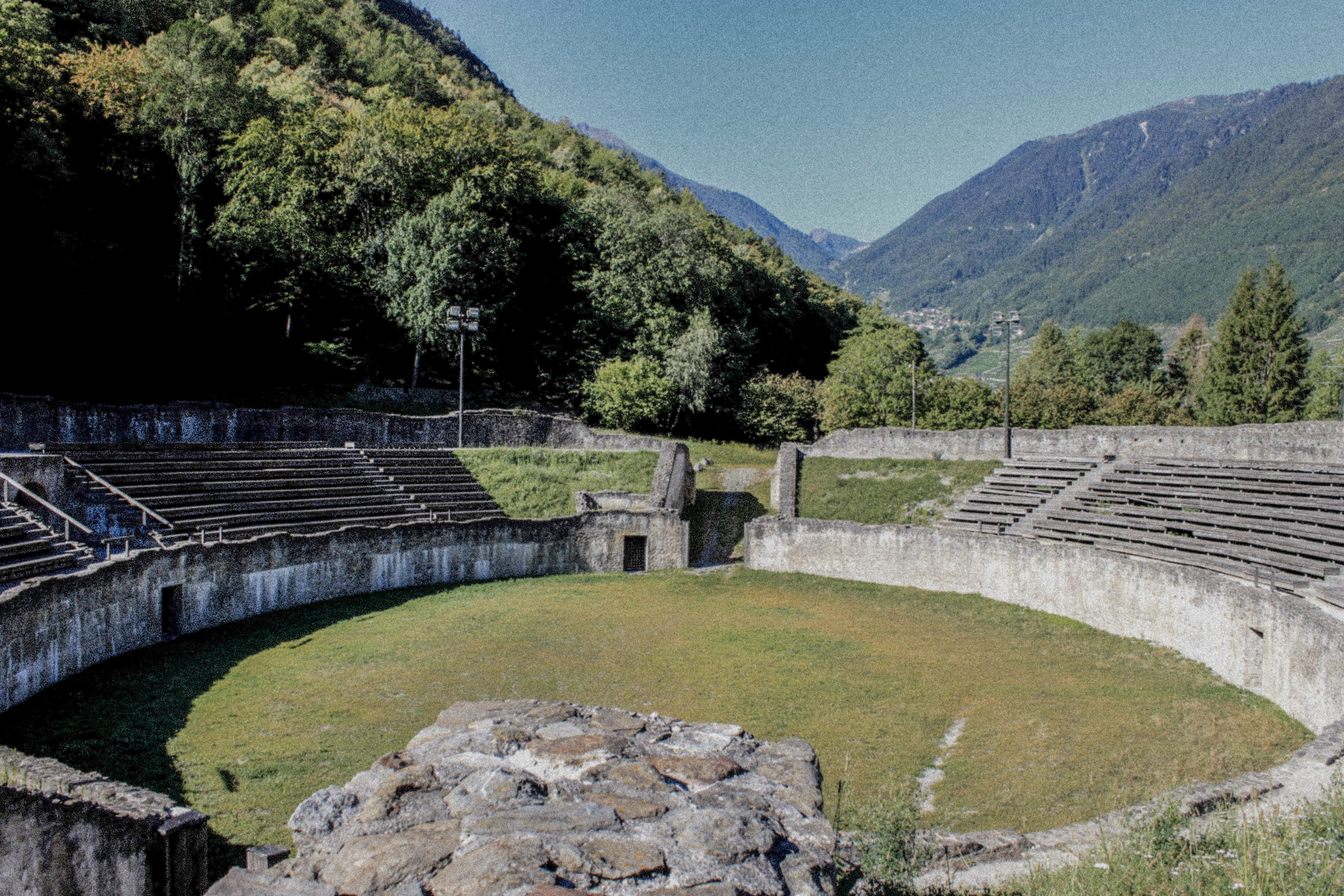 Suisse, canton du Valais, Martigny, ville romaine et moderne, amphithéâtre.